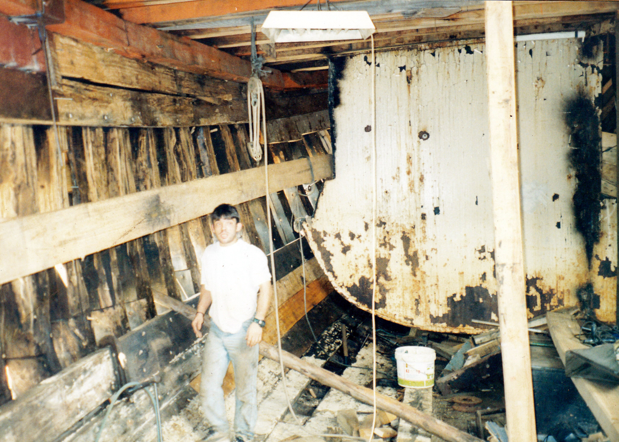 Proceso de restauracion de la cántara o bodega del barco